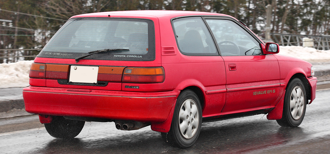 Toyota Corolla FX 1500 VS ( AE91 )